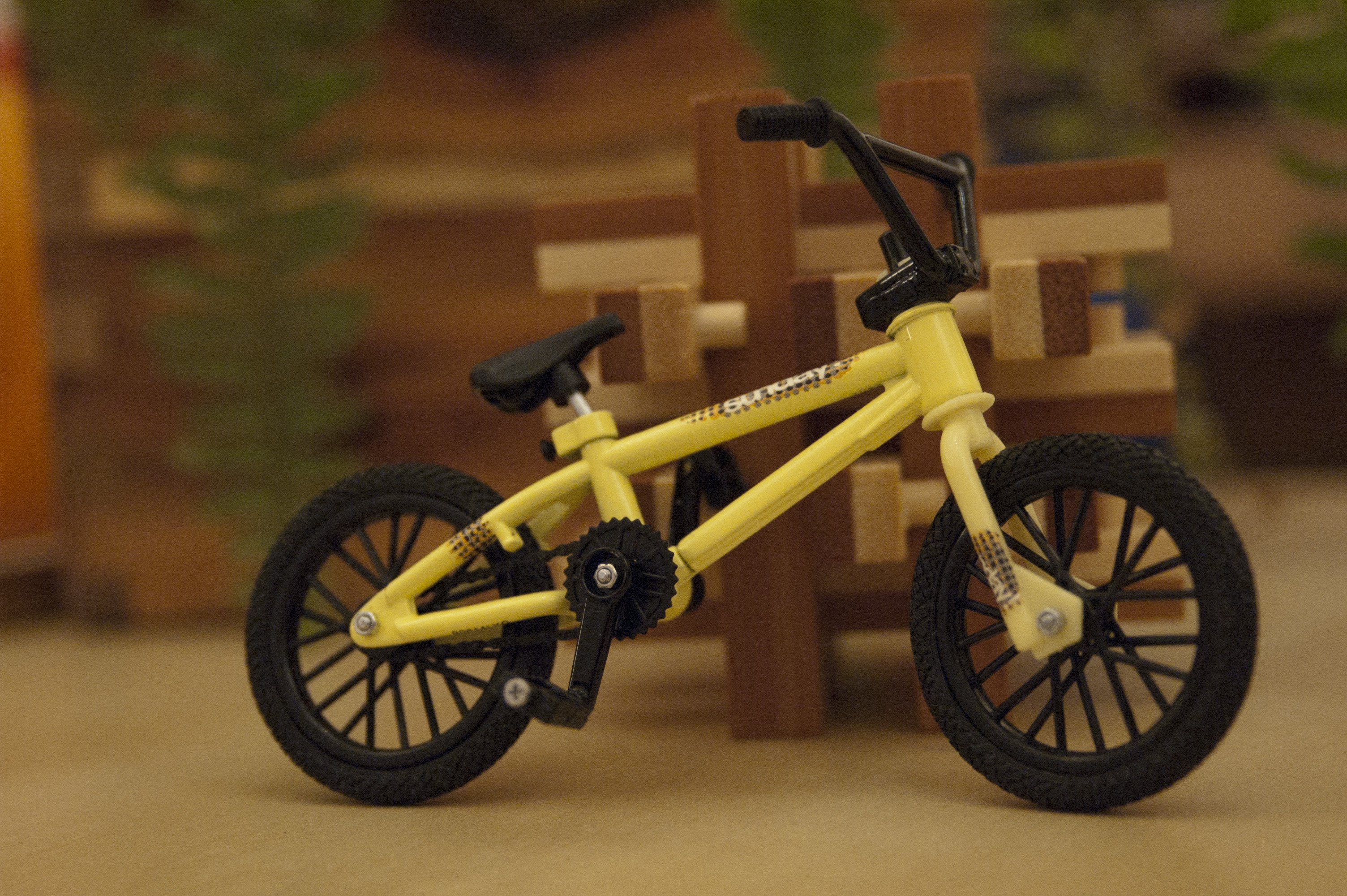 Flick Trix Sunday finger bike